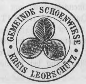 Altes Siegel bzw. Stempel der Gemeinde Schönwiese im Kreis Leobschütz.